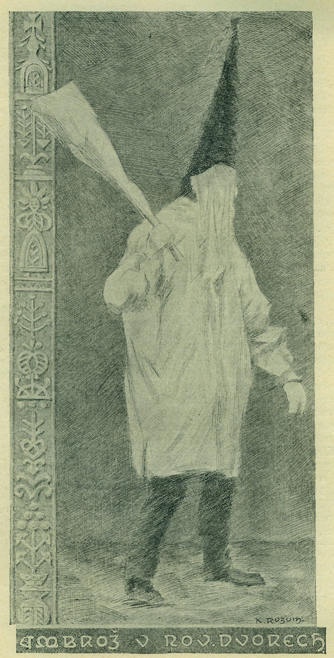 sv. Ambrož